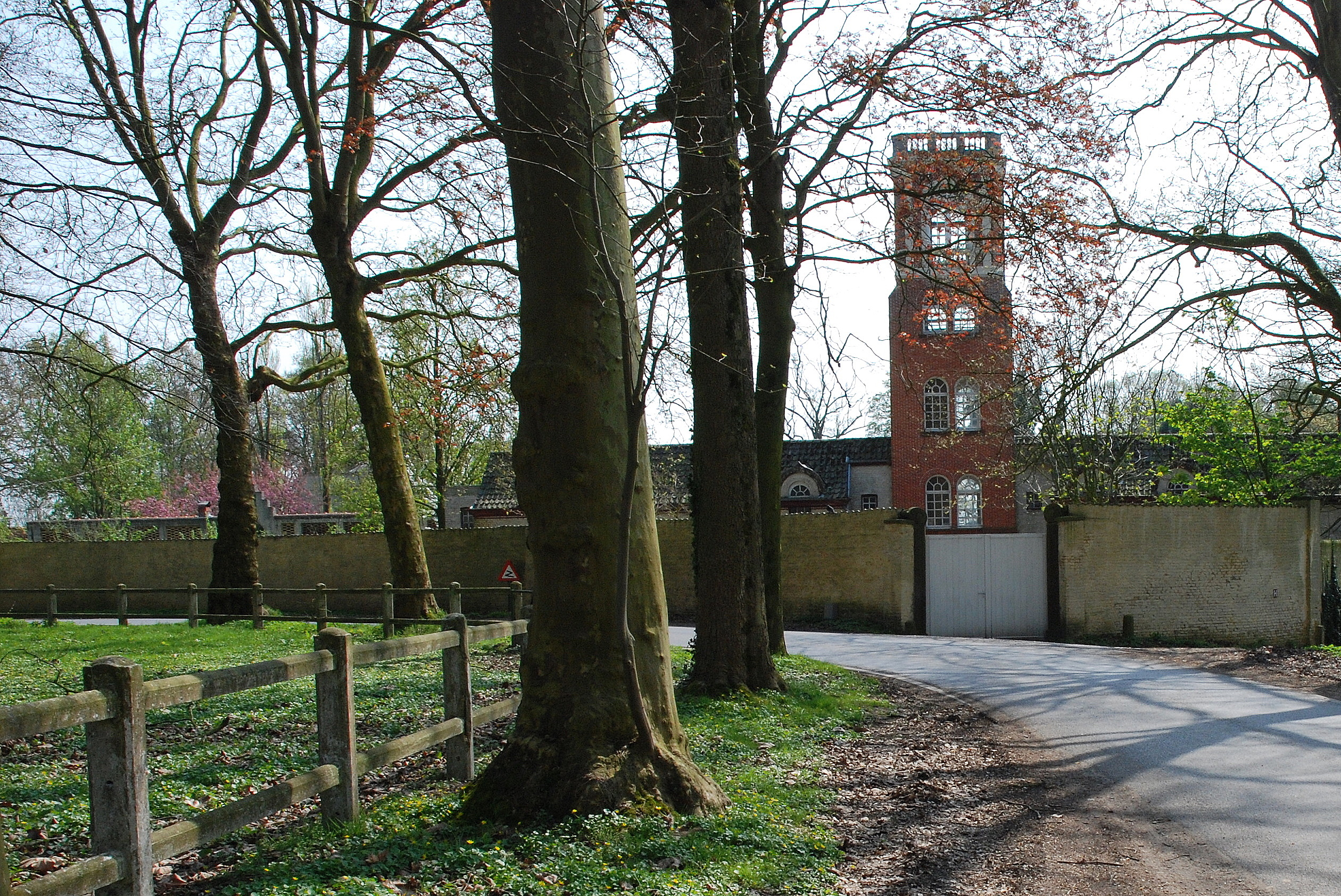 kasteel de Gerlache te Huise, België